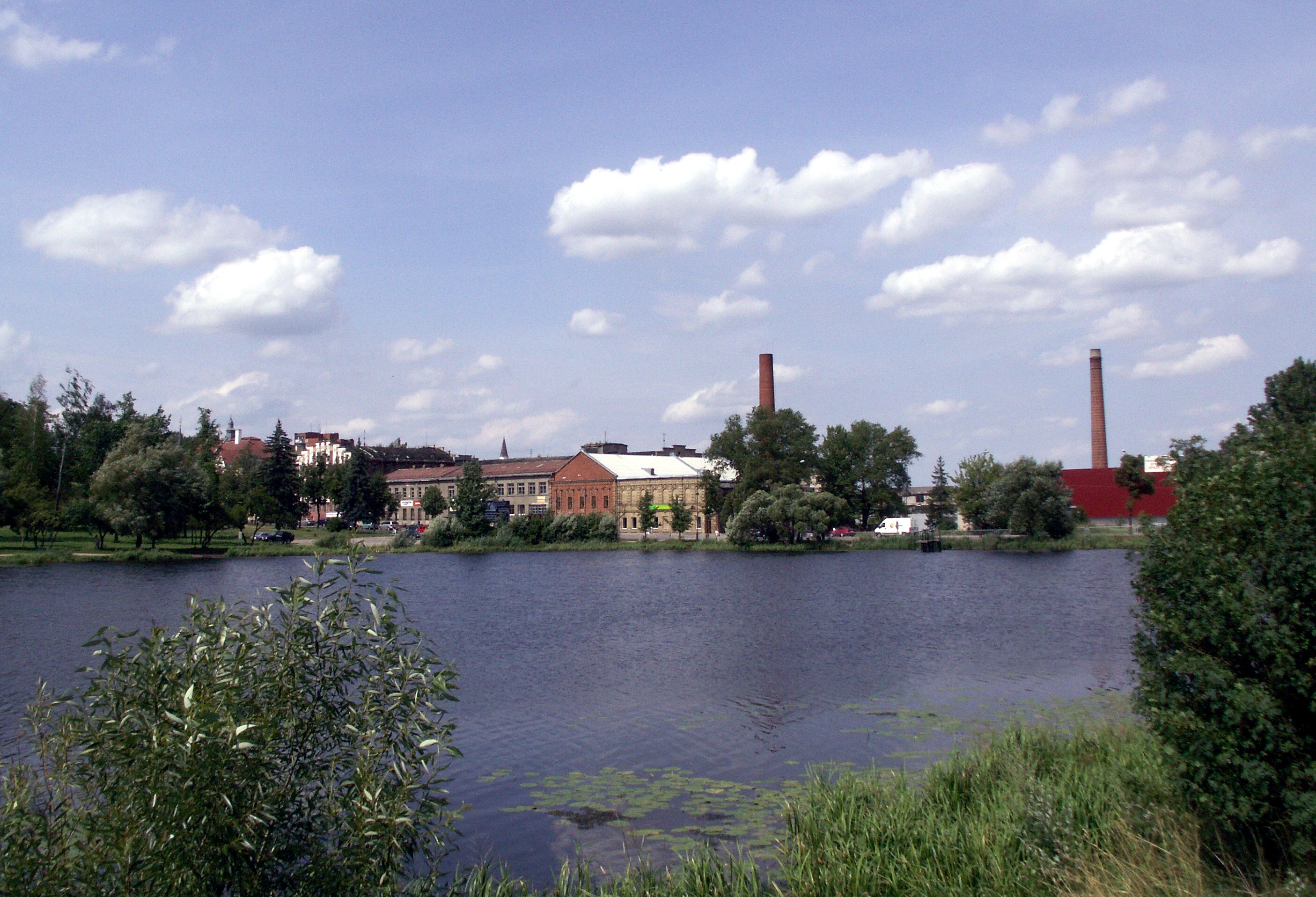 Frenkelio fabrikas nuo Šiaulių Prūdelio